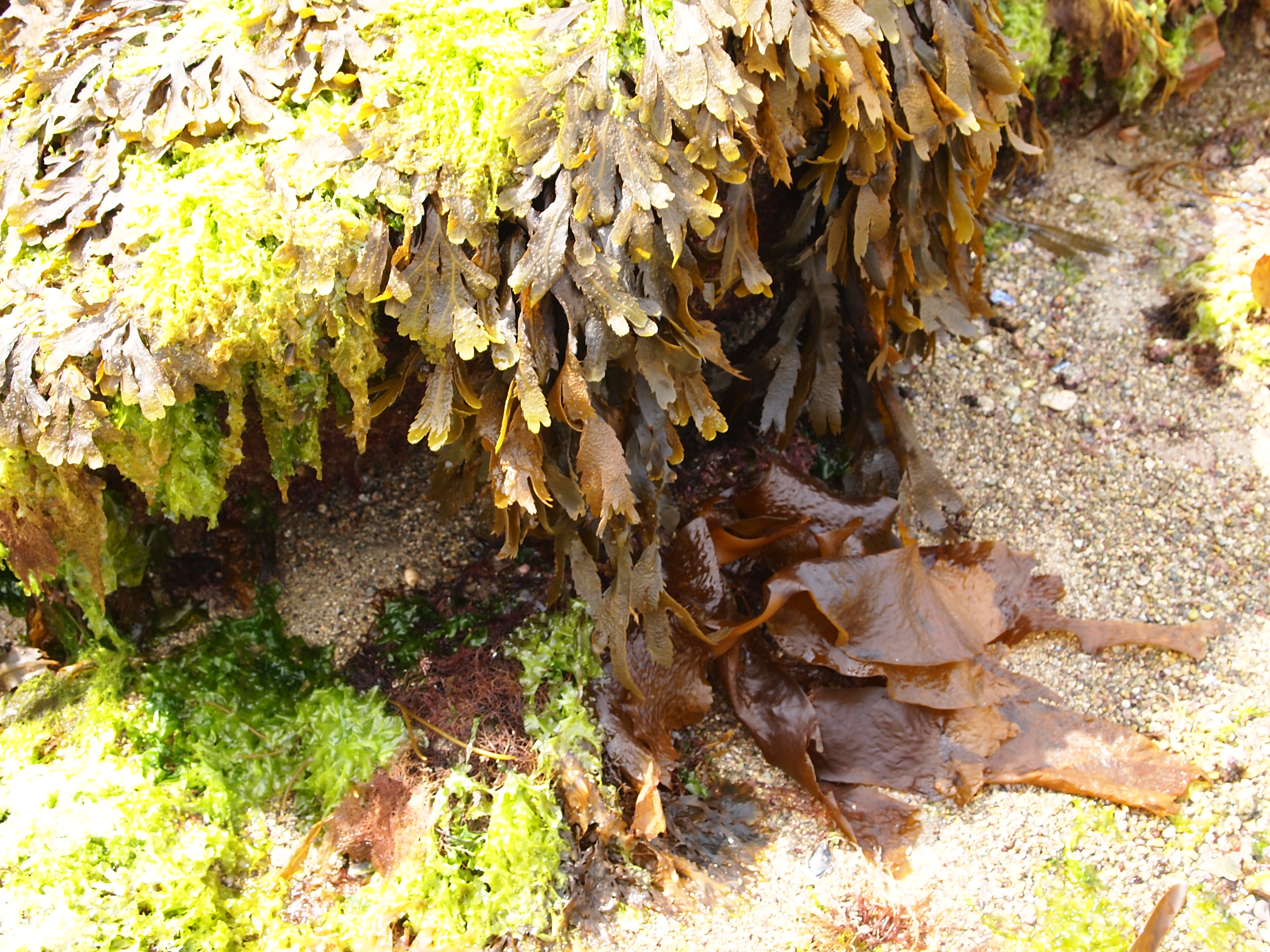 Fucus serratus et algues dans la baie de Concarneau en Bretagne (France)